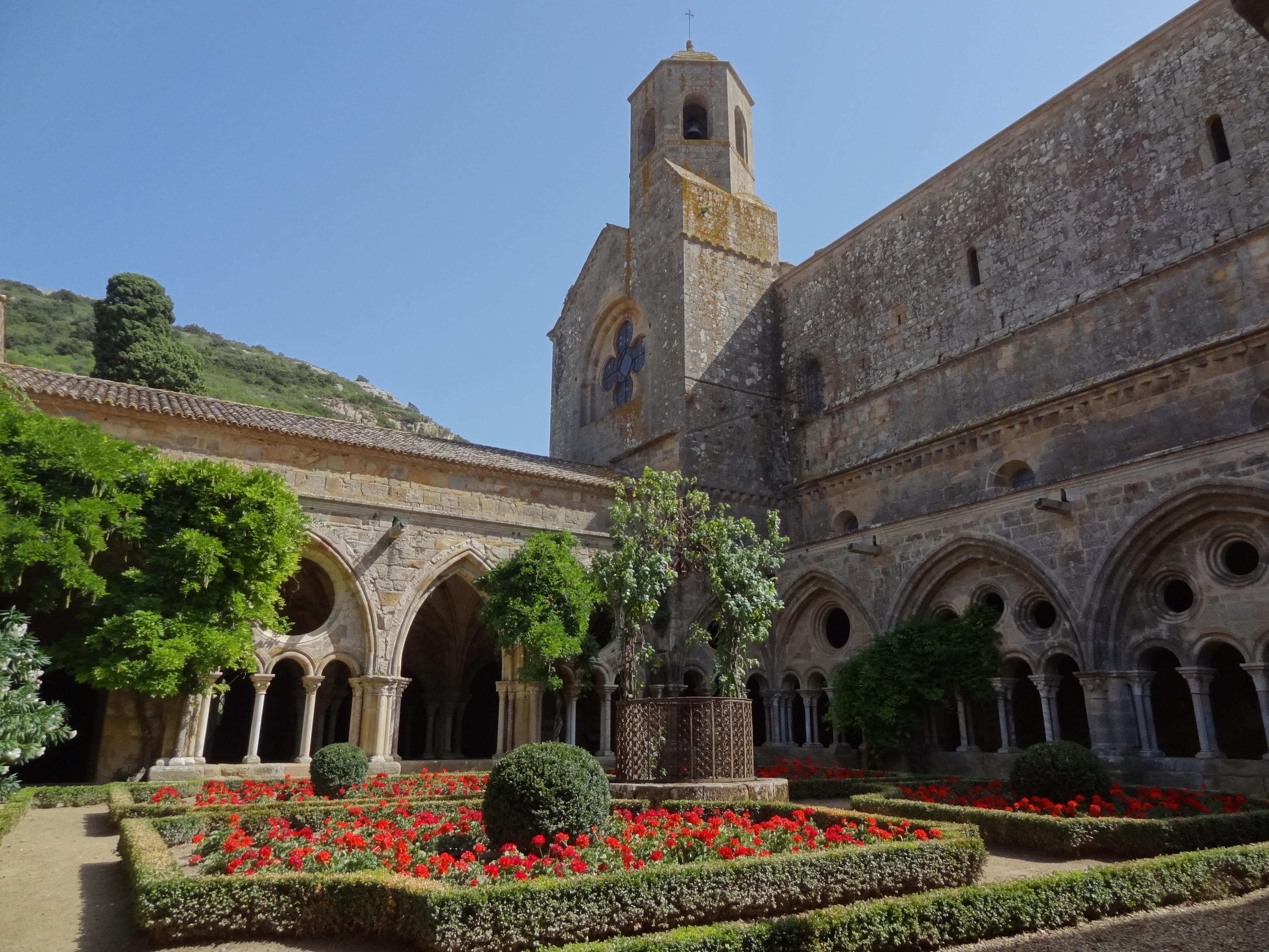 Abbaye Sainte-Marie de Fontfroide à Narbonne. .